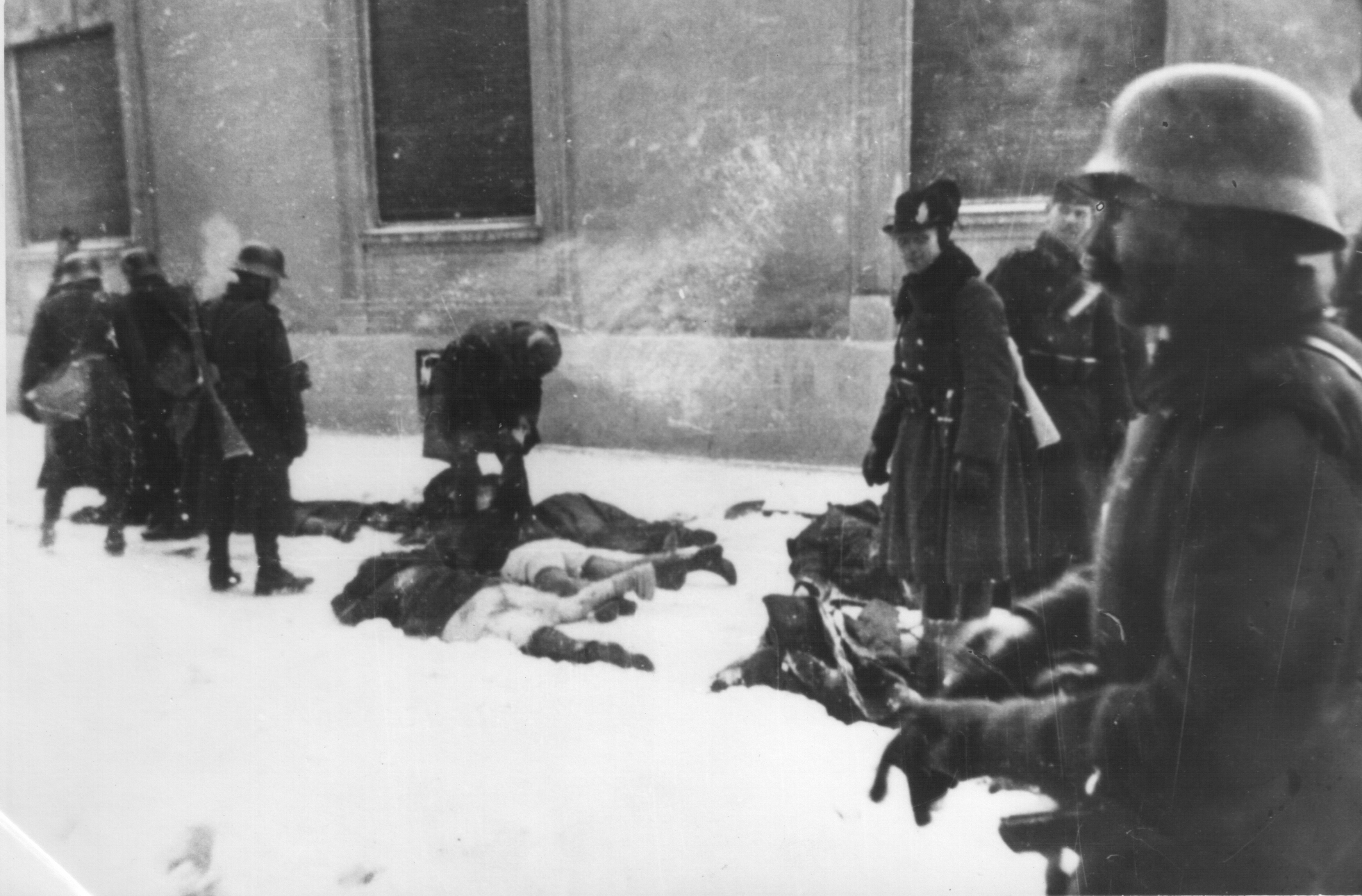 Srpskohrvatski / српскохрватски: Leševi pobijenih civila u kasarni u Novom Sadu, Futoška ulica, januara 1942.